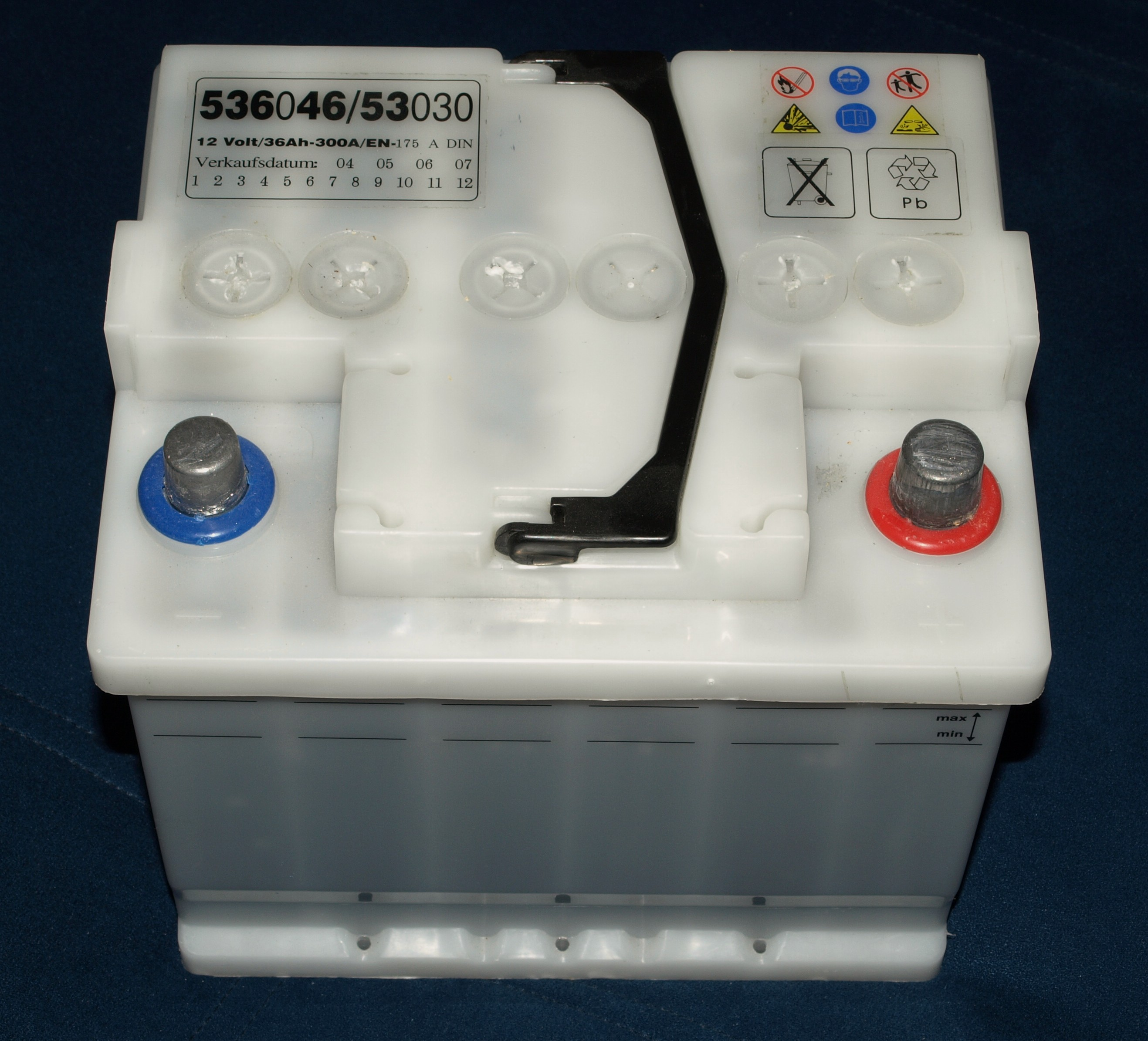 Starterbatterie, 12 V, 300 A, 36 Ah